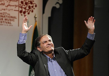 منوچهر بیگلری پور - اختتامیه بیست و هفتمین جشنواره موسیقی فجر - ۱ اسفند ۱۳۹۰